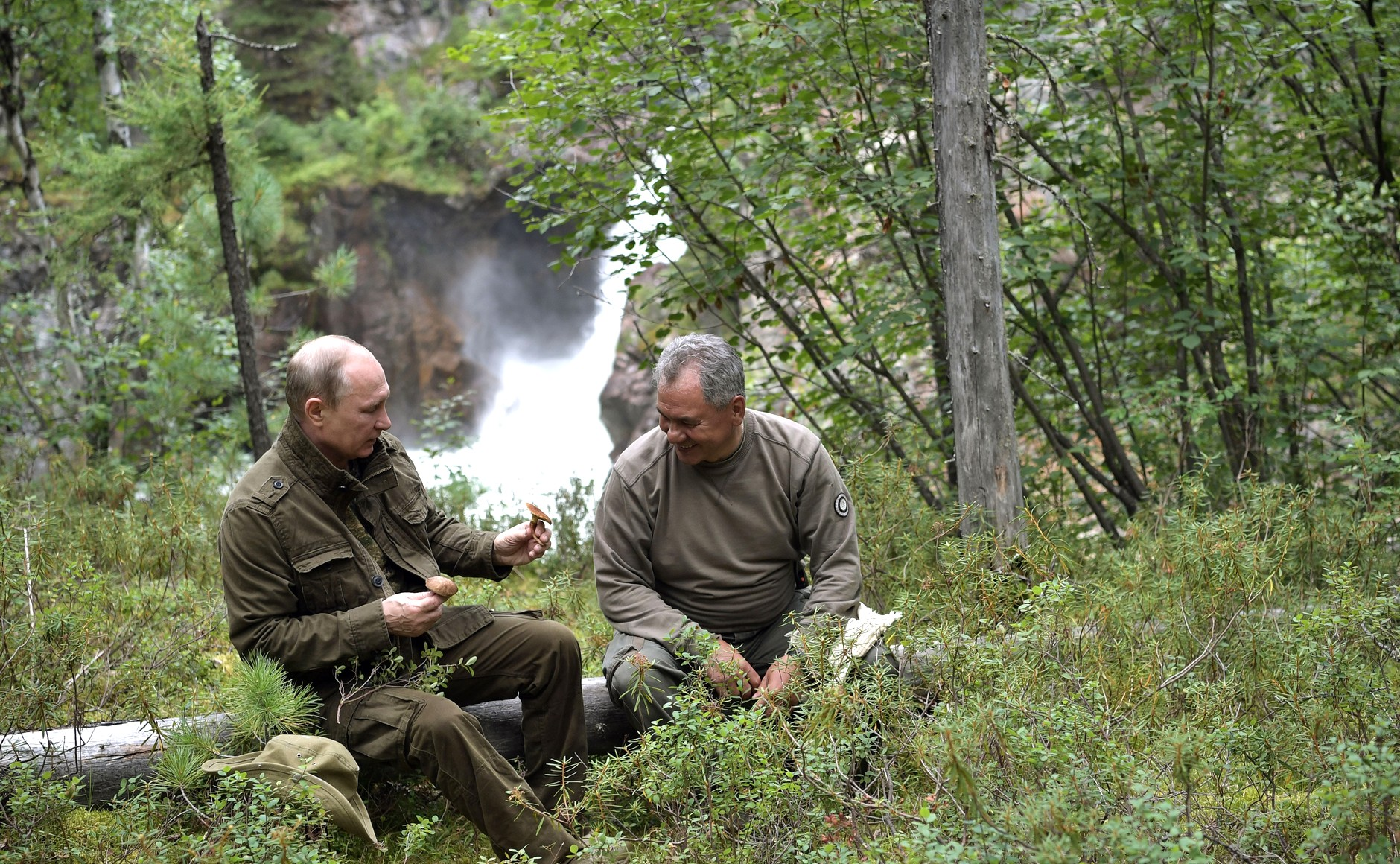 Президент России Владимир Путин с Министром обороны Сергеем Шойгу на отдыхе в Республике Тыва. 1-3 августа 2017 года.